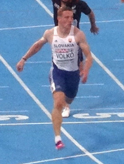 Młodzieżowe Mistrzostwa Europy w Lekkoatletyce U23 w Bydgoszczy 13-16 lipca 2017, finał biegu na 200 m mężczyzn